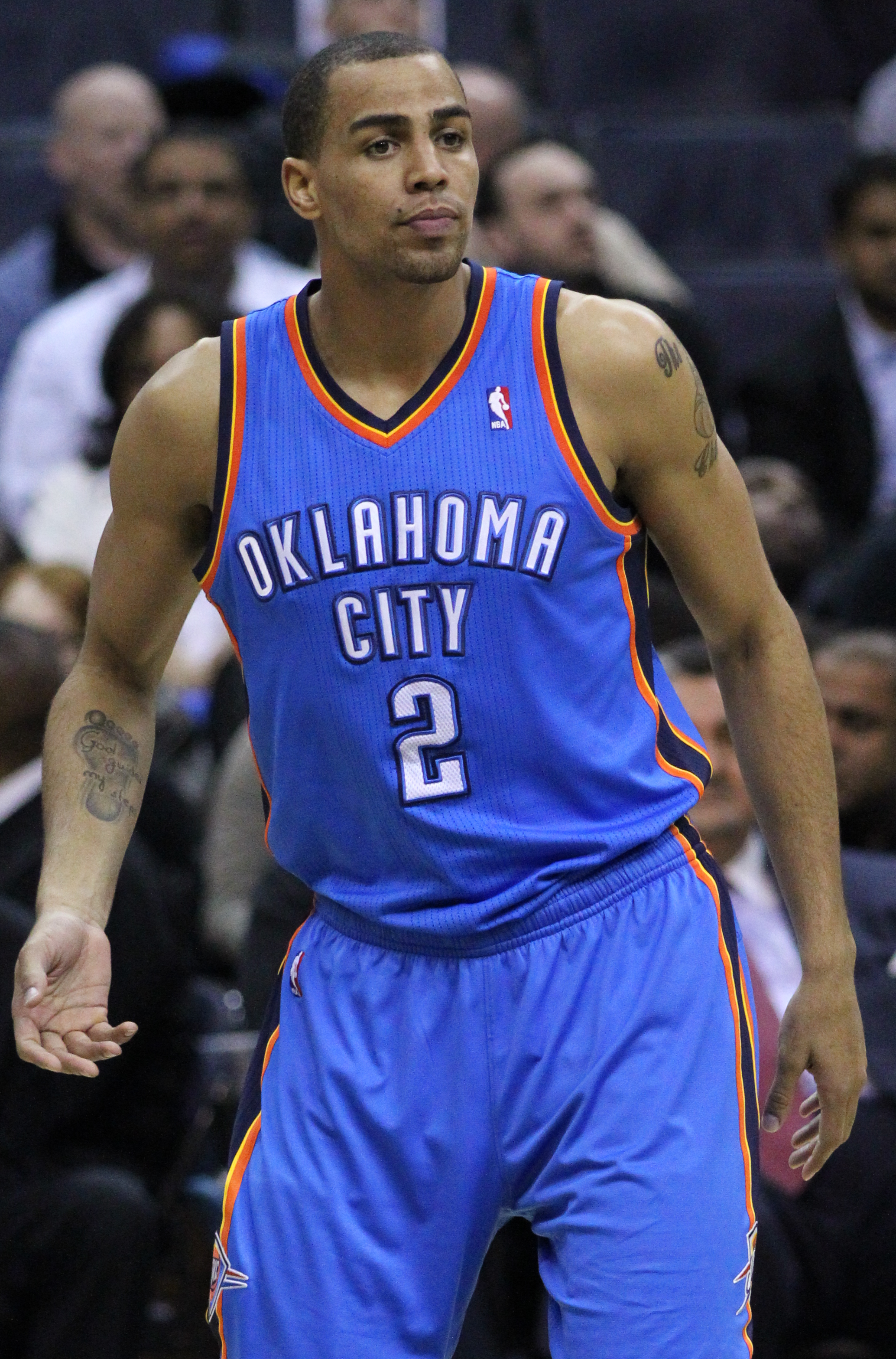 Wizards v/s Thunder 03/14/11